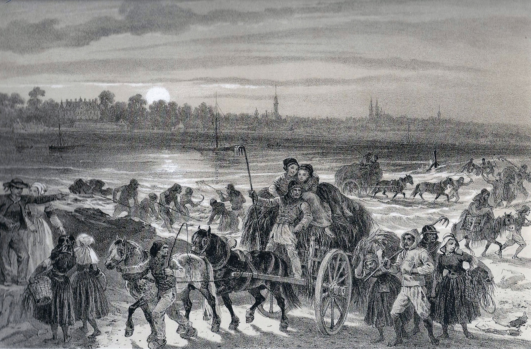 Coupe de goémon à Sainte-Anne (dessin de François Hippolyte Lalaisse publié en 1867 dans "La Bretagne contemporaine", tome "Finistère")